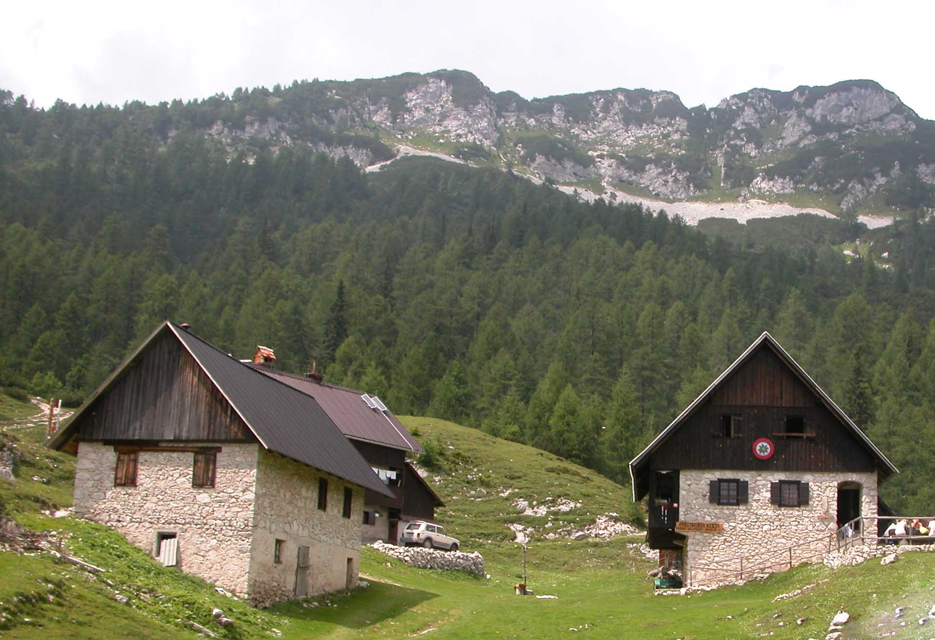 Blejska koča, alpine hut in Slovenia (above Pokljuka) photo:Ziga 10:32, 16 April 2007 (UTC)